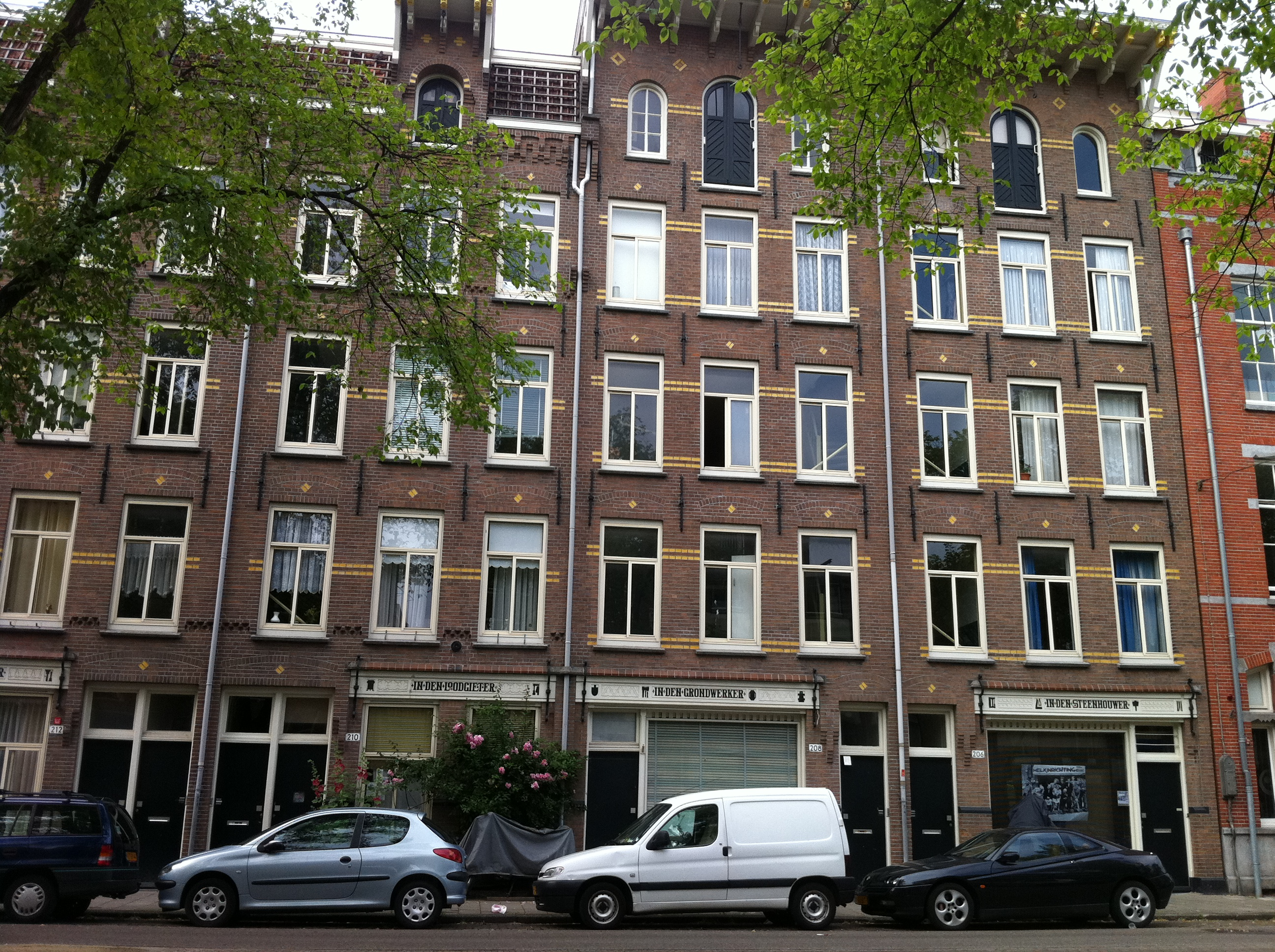 Woonblokken van Bouwonderneming Concordia aan de Lindengracht